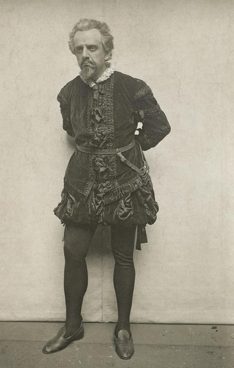 Jaroslav Hurt (1877 - 1959), Český herec, režisér, divadelní ředitel a pedagog. J.Hurt v roly Zdislava Berky z Dubé ve hře B.Adámka Salomena